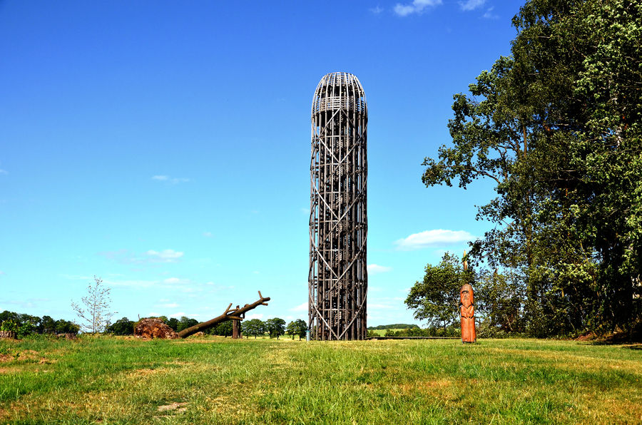 Dřevěná rozhledna v obci Heřmanice na severu Čech.